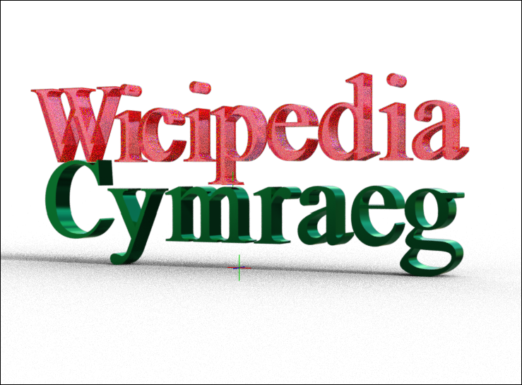 Y geiriau "Wicipedia Cymraeg" mewn 3D.